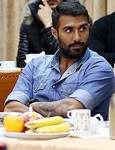 نشست شهردار مشهد با دو تیم سیاه جامگان و پدیده